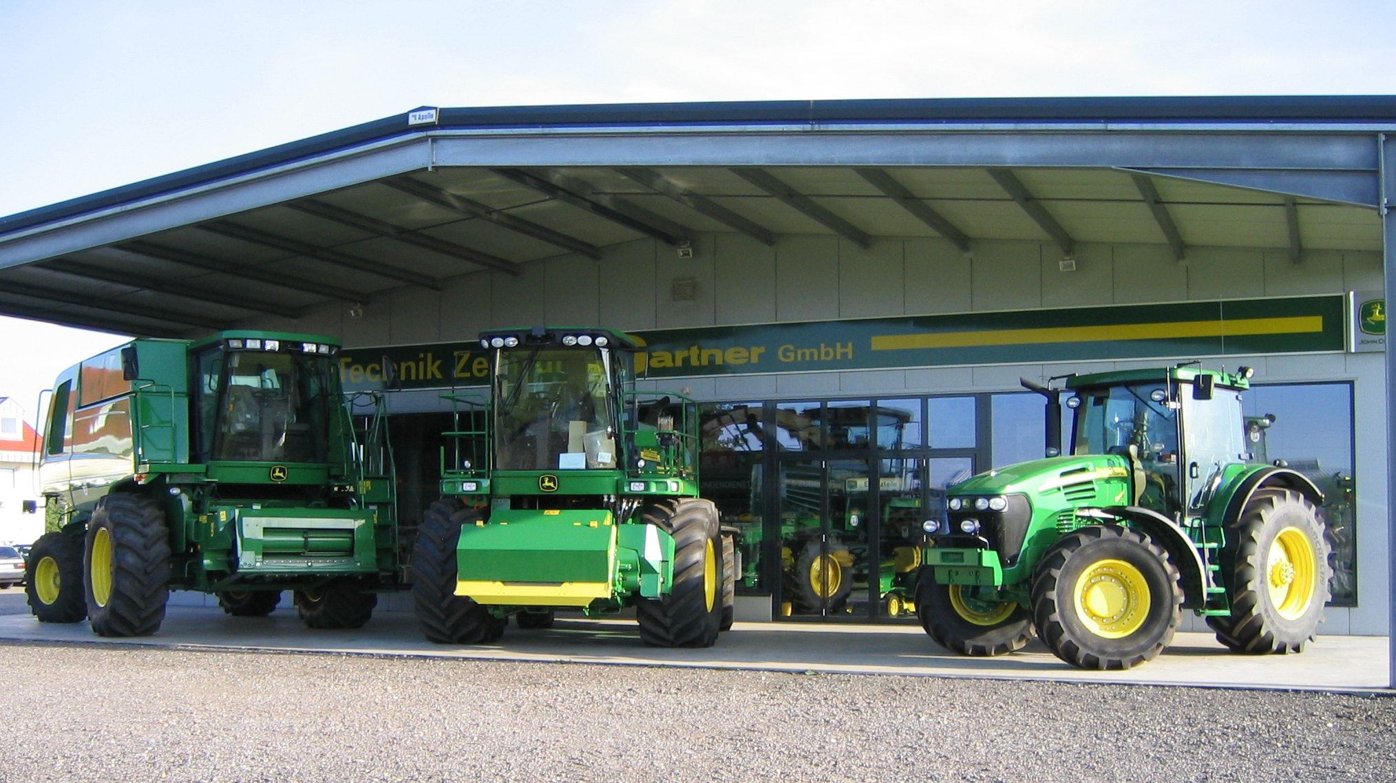 John-Deere-Maschinen (Mähdrescher, Häcksler, Traktor) bei einem John-Deere-Vertragshändler in Ringsheim, Baden-Württemberg, Deutschland